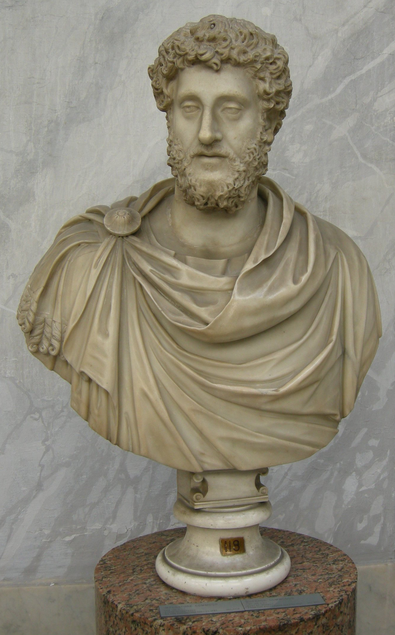 Ritratto di Commodo, su busto di restauro, da Tor Bovacciana (Ostia). Musei Vaticani, Museo Chiaramonti - Braccio Nuovo; inv. 2218.